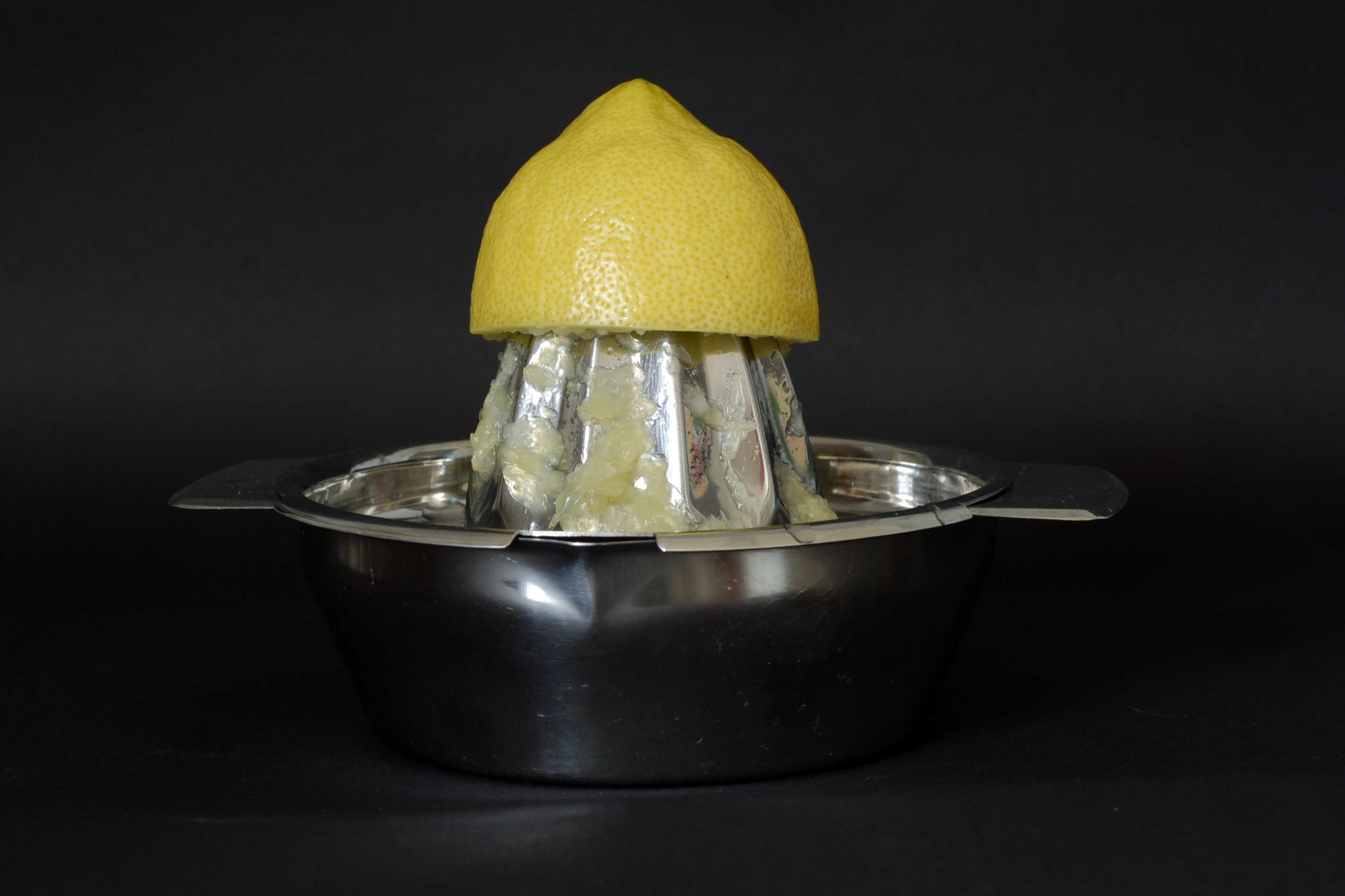 Zitrone auf Zitronenpresse